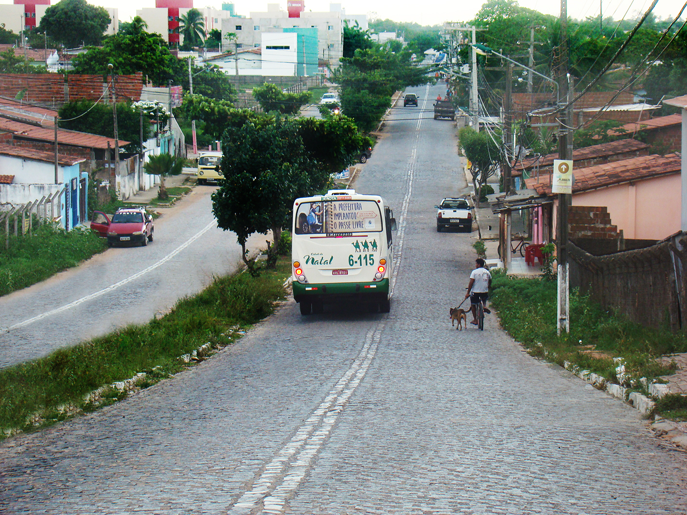 Desenvolvimento